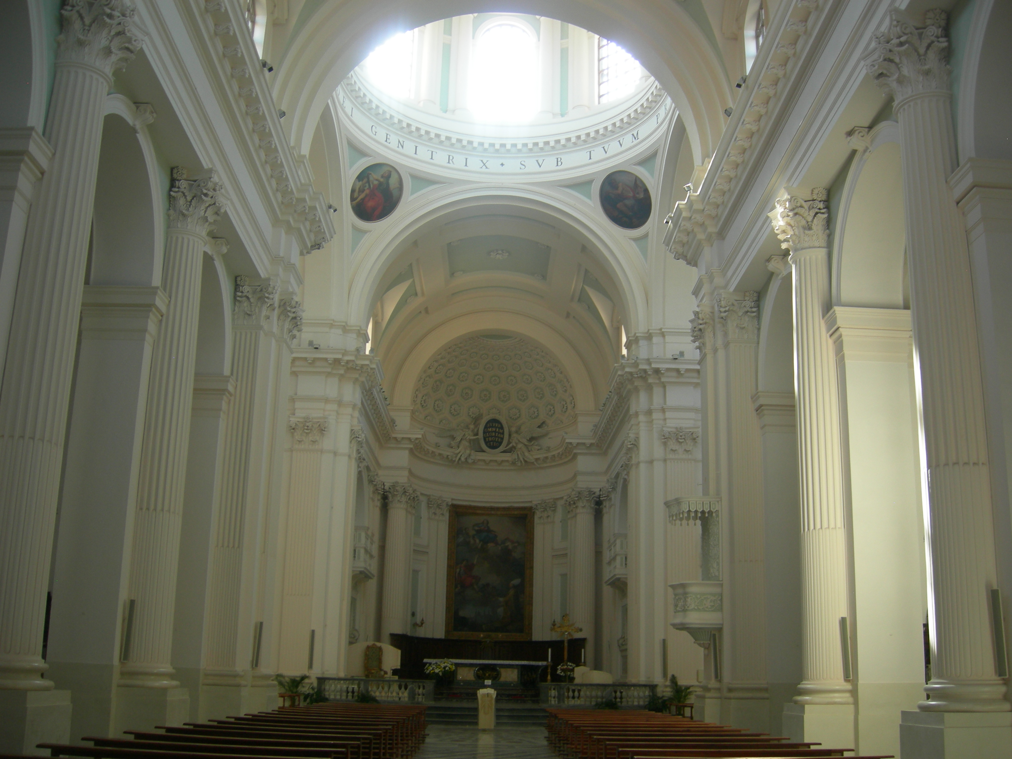 Interno del Duomo di Urbino, Italia.